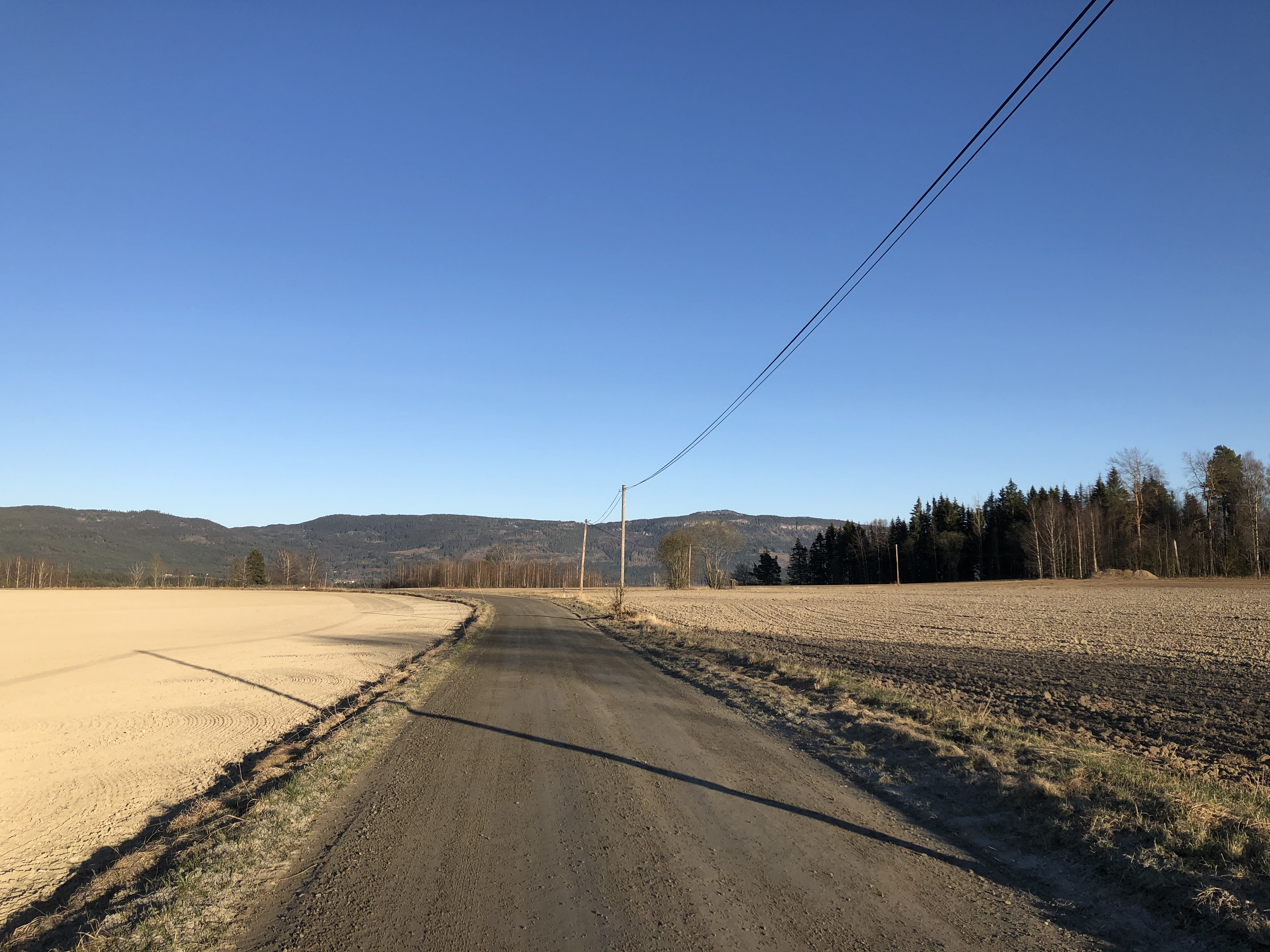 Tandbergmoveien, Ringerike